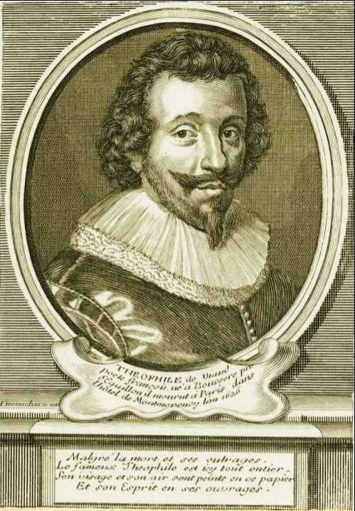 Portrait de Théophile de Viau.